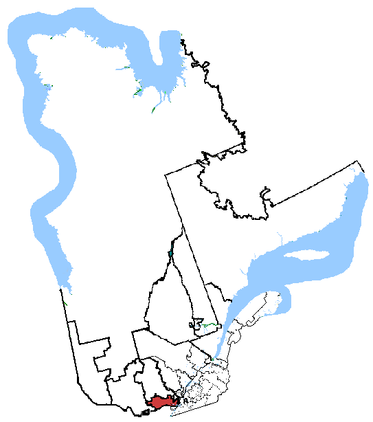 Map of Argenteuil—Papineau—Mirabel, Quebec